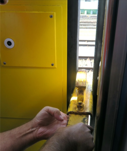 Am 4. August 2019 funktionierte der Einklemmschutz einer Türe nicht und ein Zugbegleiter wurde mitgeschleift.